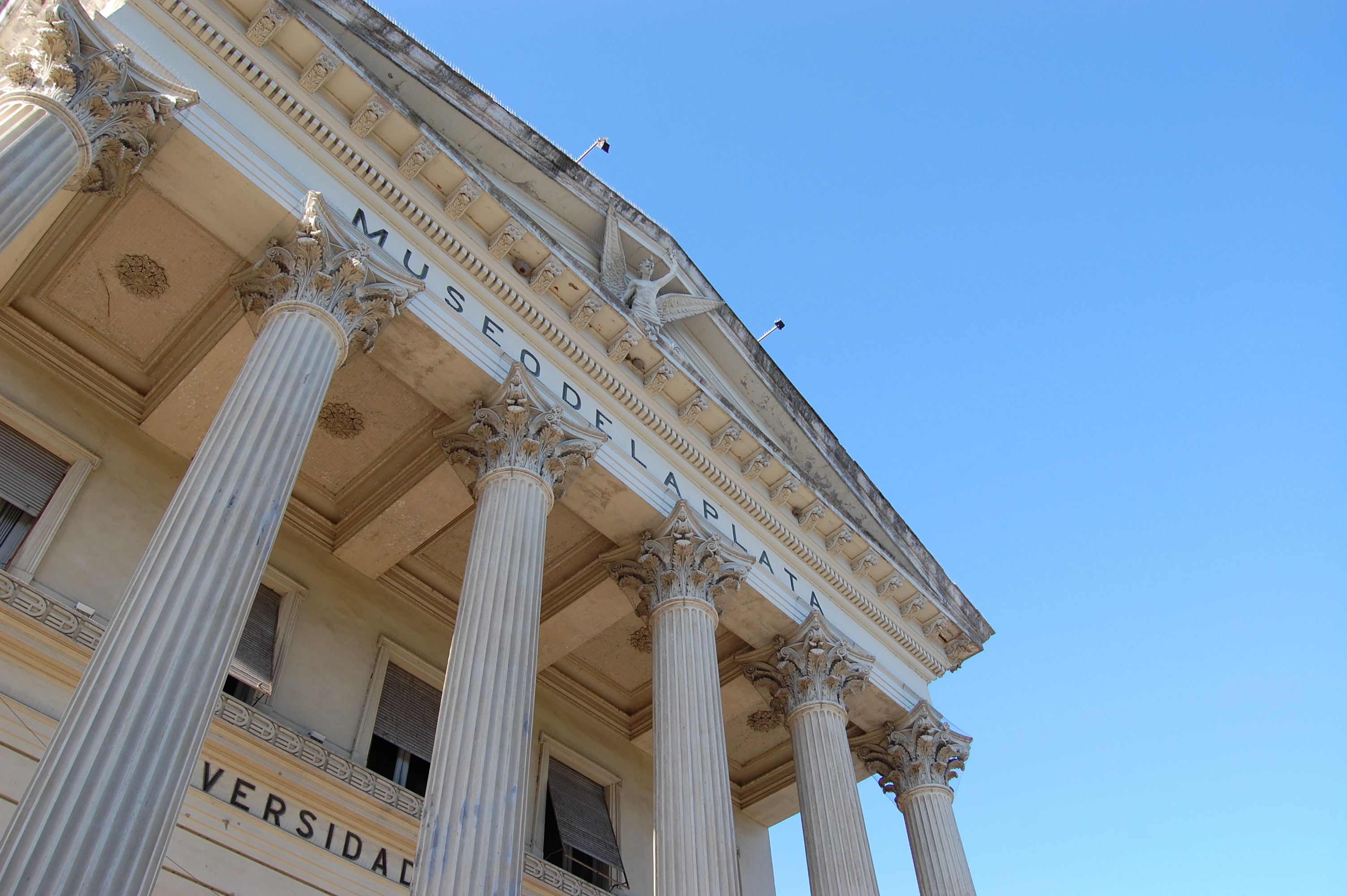 Museo de Ciencias Naturales